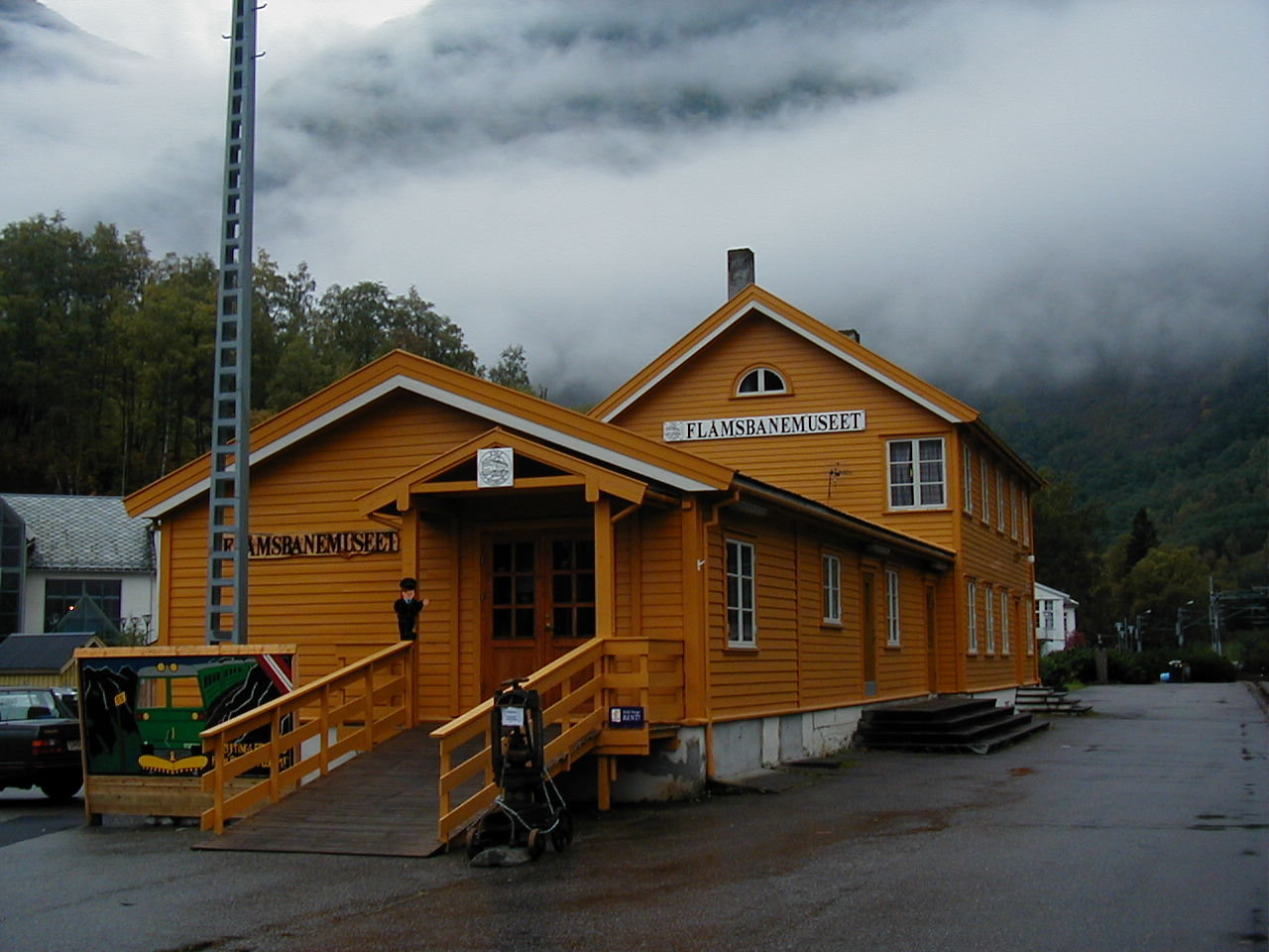 Flåmsbanemuseet (før nokon kom på å skrive namnet Flåmsbana Museet)